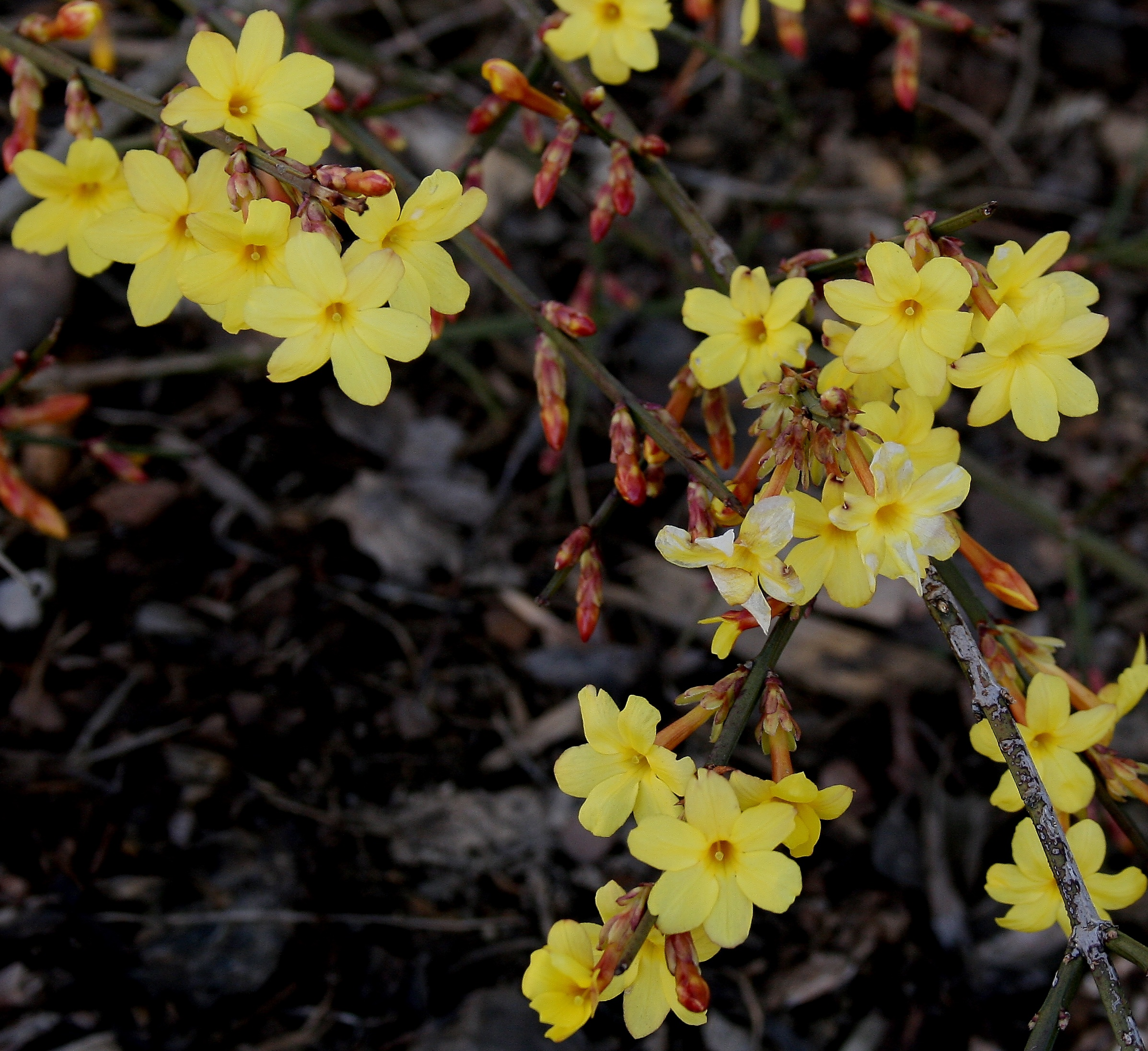 Winterjasmin